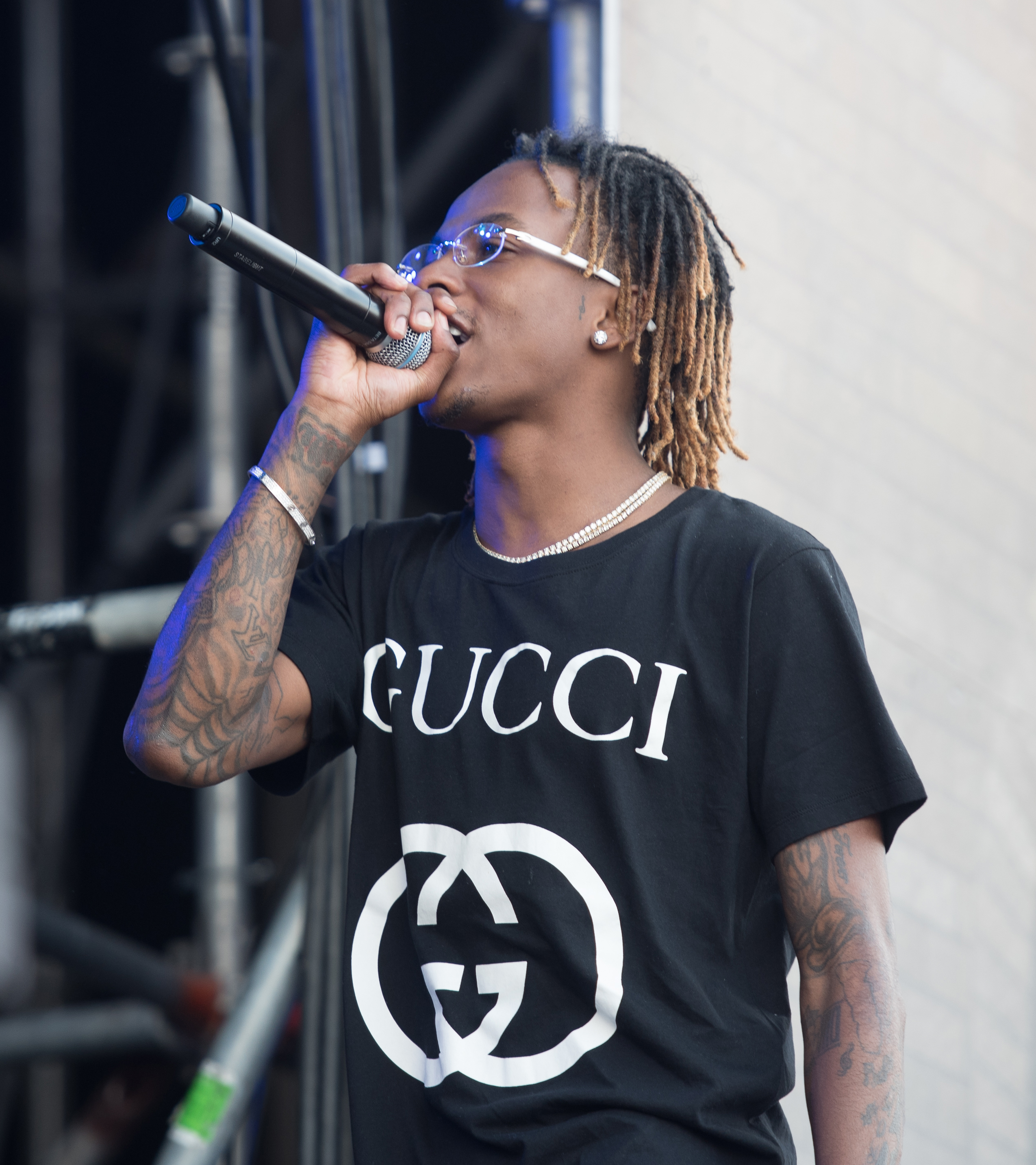 Rich The Kid live auf dem Openair Frauenfeld 2019